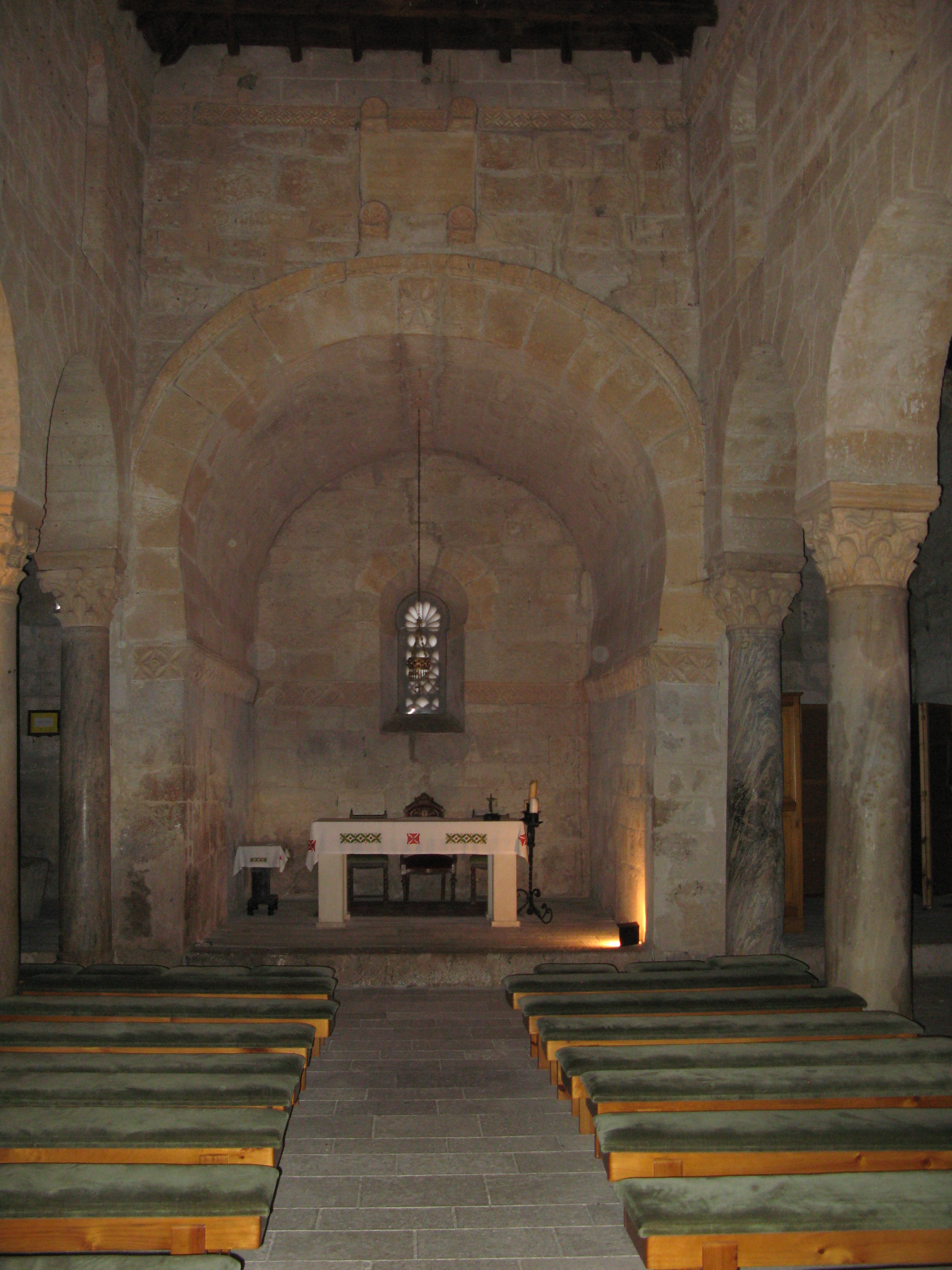 INTERIOR DE LA IGLESIA DE SAN JUAN DE BAÑOS EN LA LOCALIDAD DE BAÑOS DE CERRATO, MUNICIPIO DE VENTA DE BAÑOS, PROVINCIA DE PALENCIA, COMUNIDAD DE CASTILLA Y LEÓN, ESPAÑA.